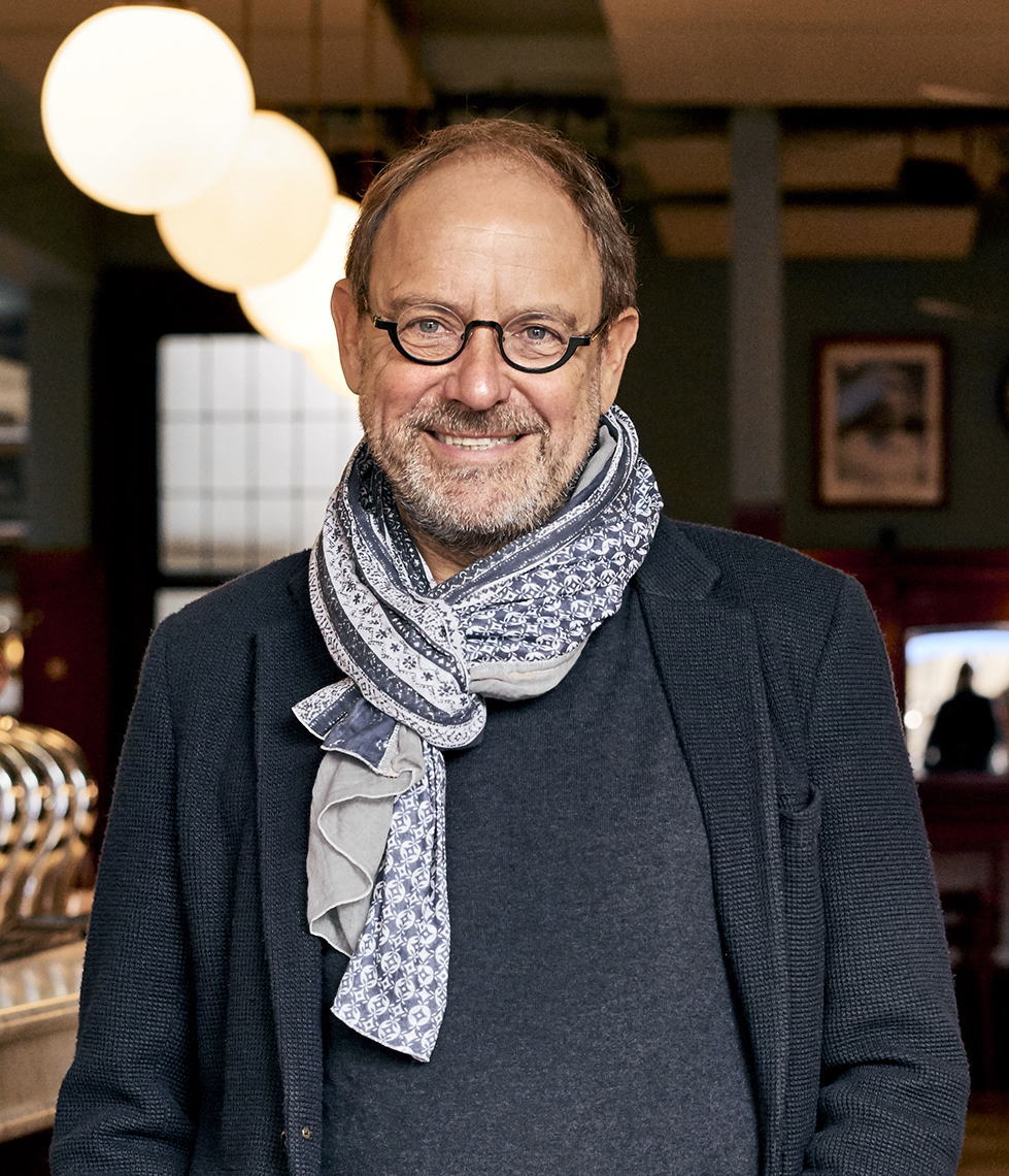 Pierre Kroll par Yves Dethier (DYOD)